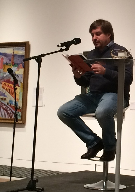 Bilden tagen under Stockholm Literature